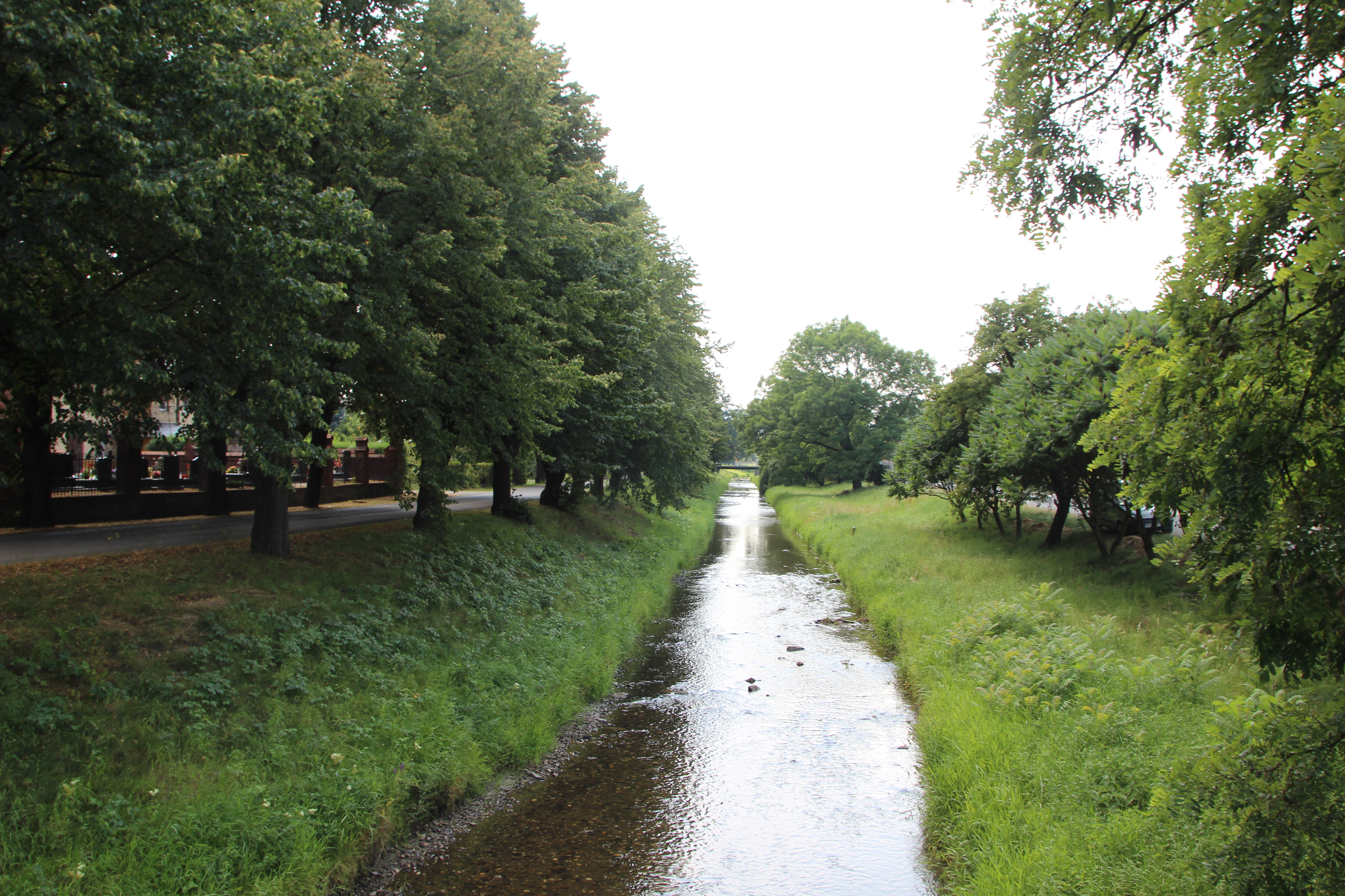 Raczyna (Račí potok, Krebsbach) w Trzeboszowicach – wieś w Polsce, w województwie opolskim, w powiecie nyskim, w gminie Paczków.